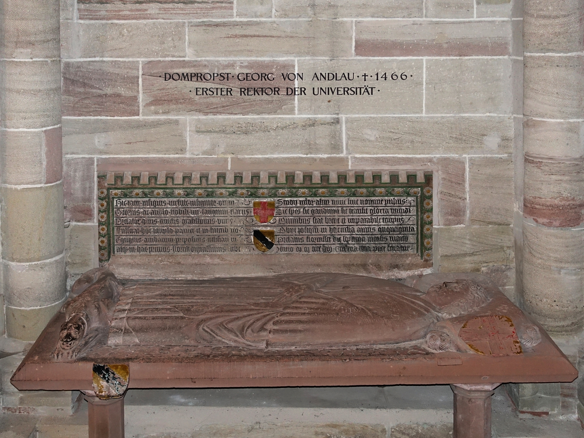 Grab von Georg von Andlau (1390-1466) Domherr in Basel, Basler Münster